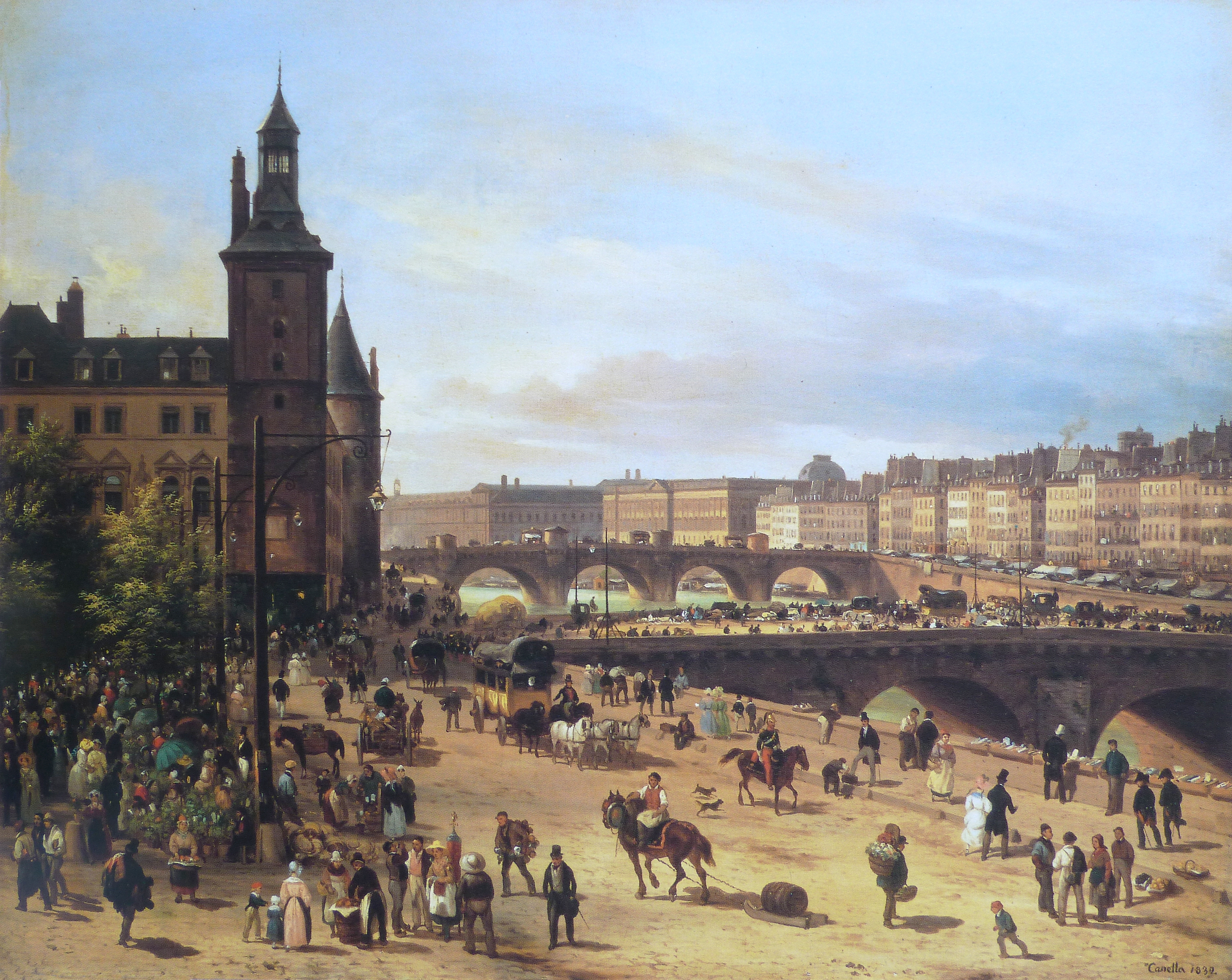 Le marché aux fleurs, la tour de l'Horloge, le pont au Change et le pont Neuf